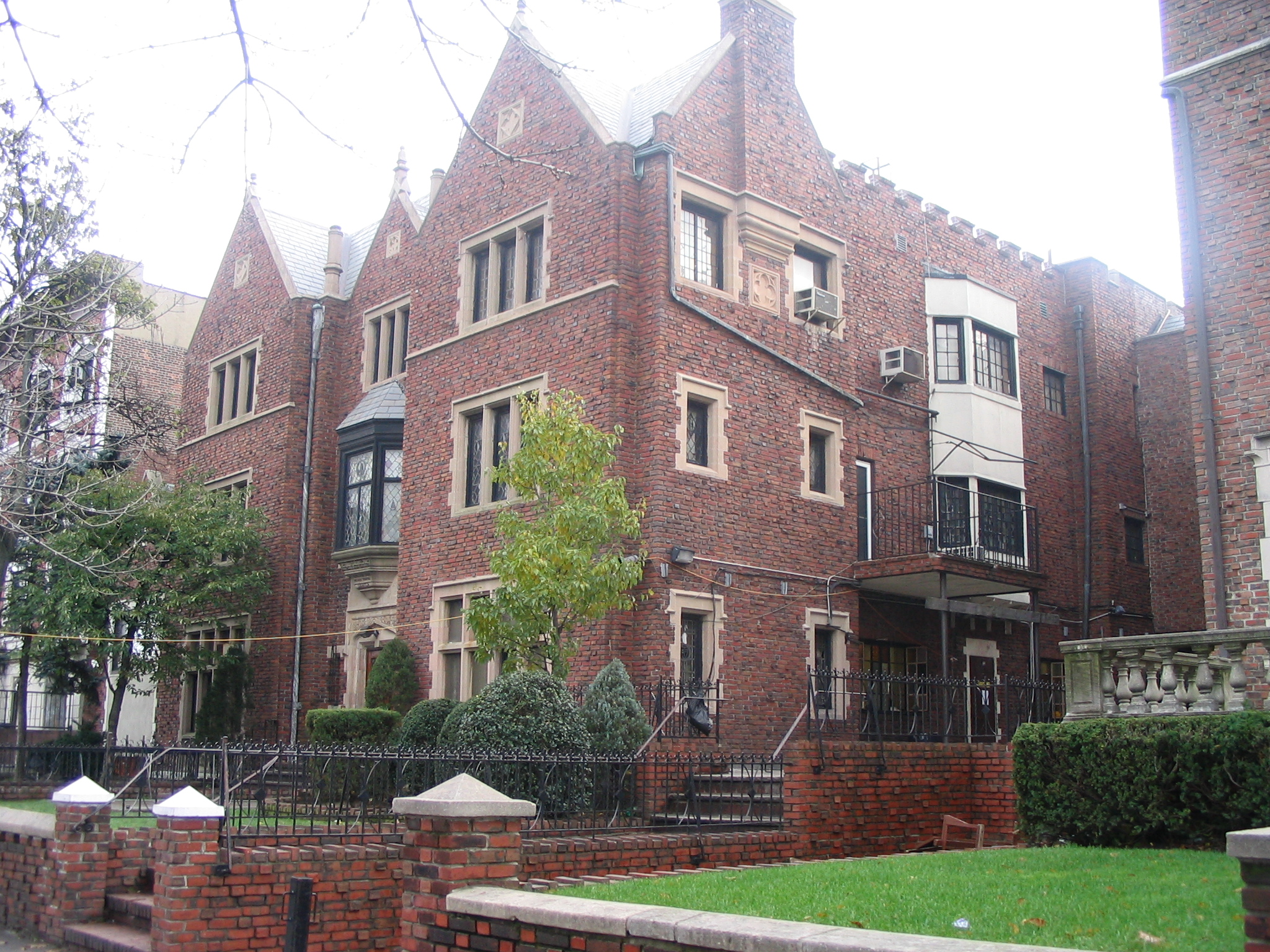 מרכז חב"ד העולמי 770 מצד ימין, בית הכנסת ובית המדרש ומקום משרדו של he:הרבי מליובאוויטש, ברחוב איסטען פארוקווי, בשכונת he:קראון הייטס שבhe:ברוקלין. .